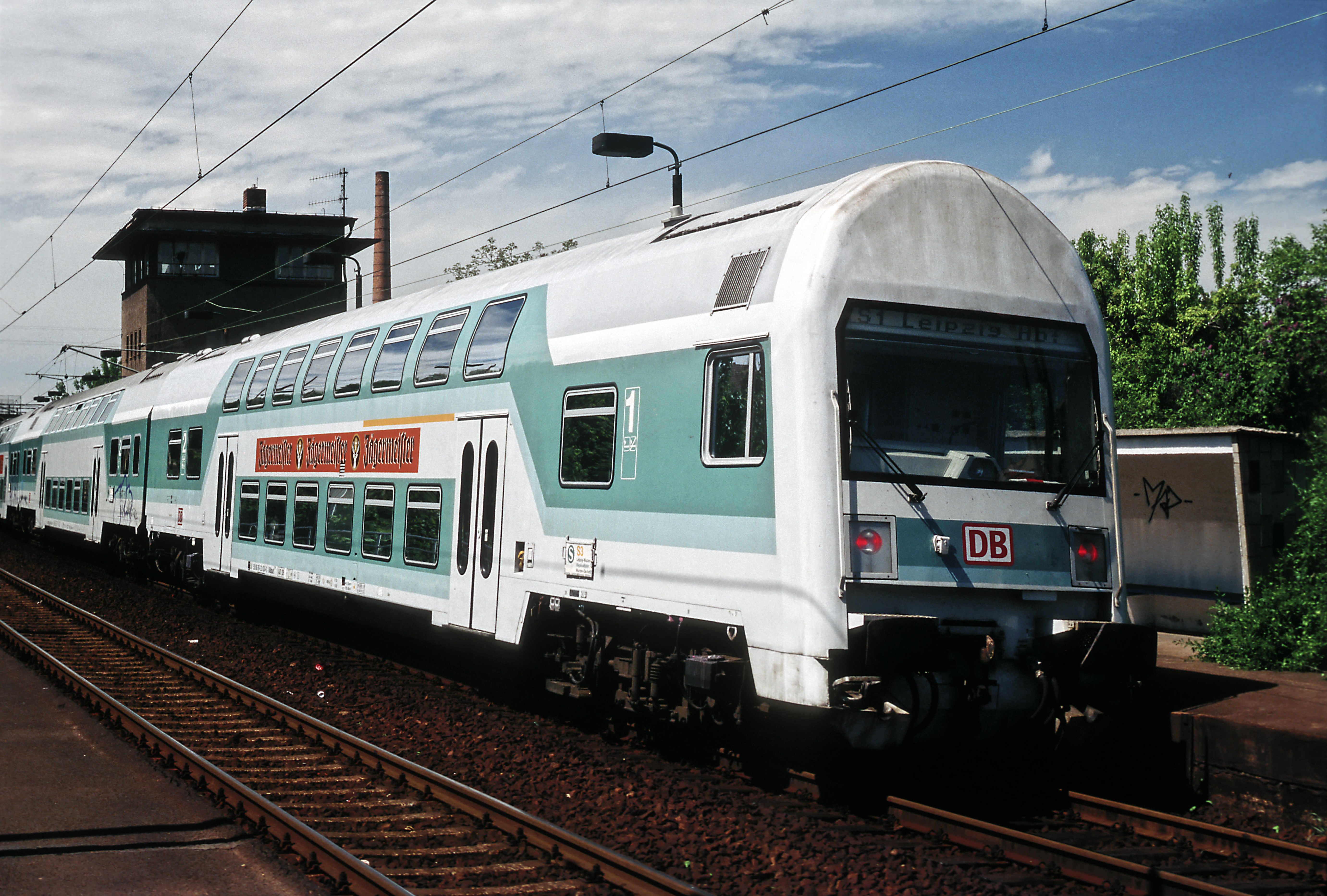 Typische Leipziger S-Bahn-Garnitur um die Jahrtausendwende, Neubausteuerwagen, Umbaumittelwagen und Lok der BR 143. Noch haben die Ausbauarbeiten der LD-Strecke Sellerhausen nicht erreicht.